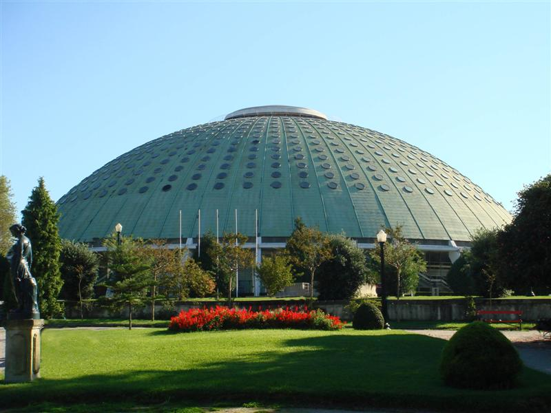 Palacio de Cristal Porto Portugal